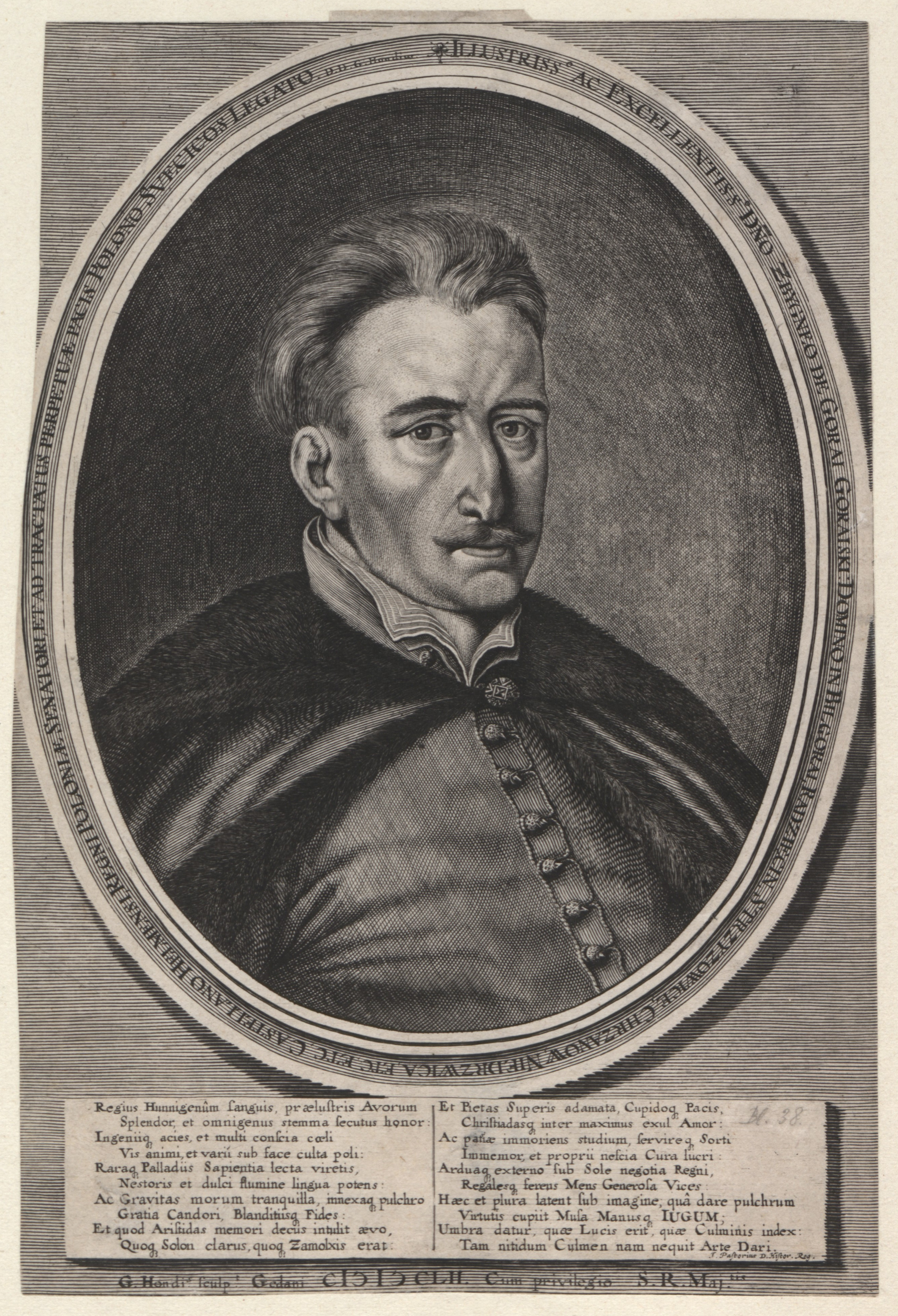 Zbigniew Gorajski